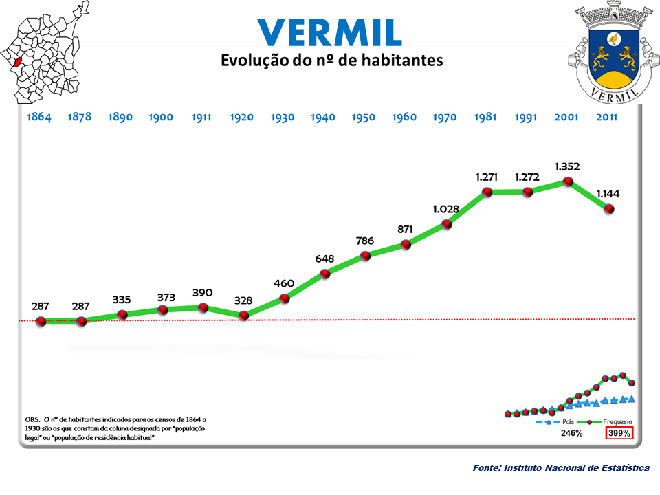 Censo 2011